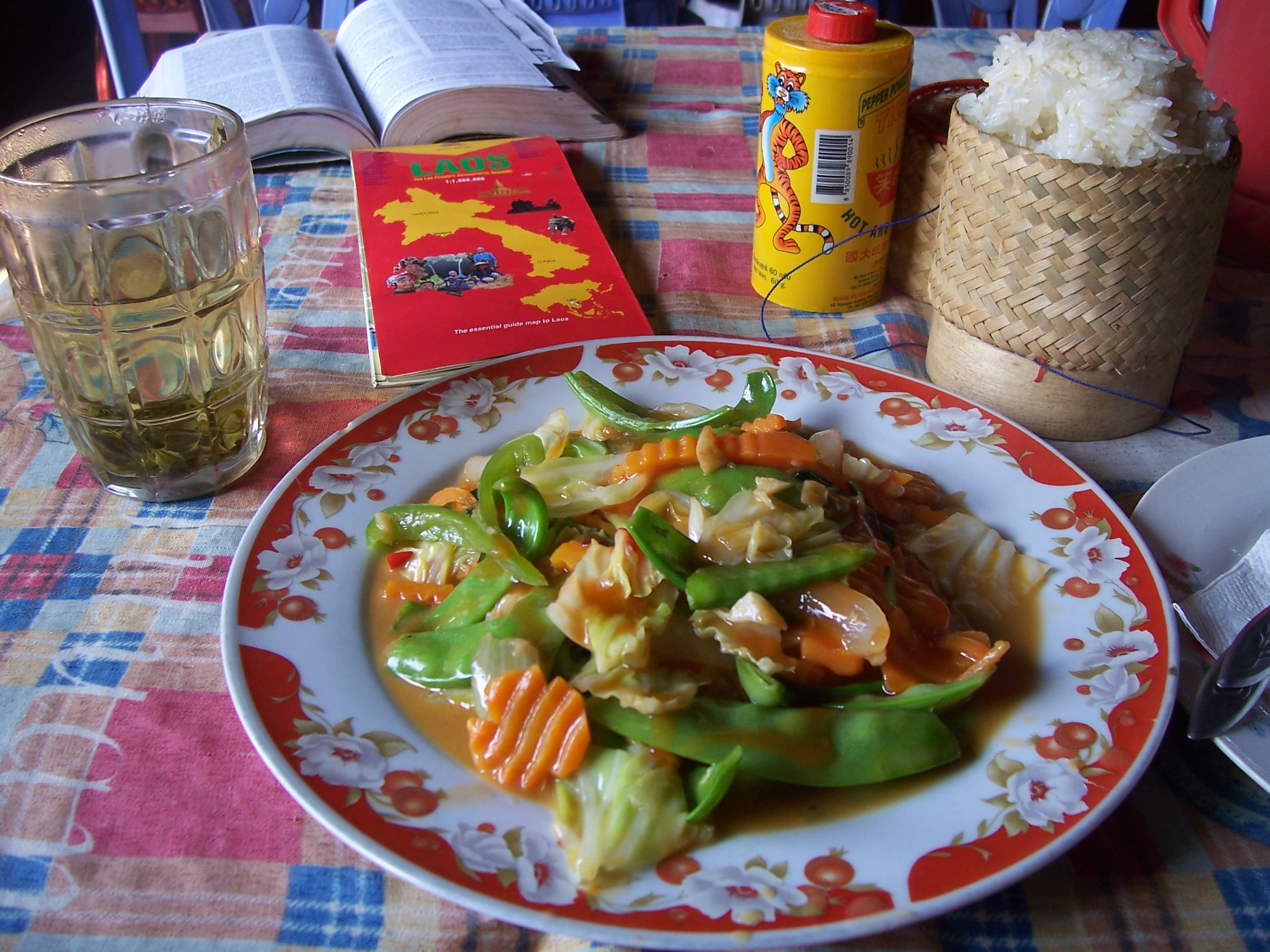 A Lao popular meal.